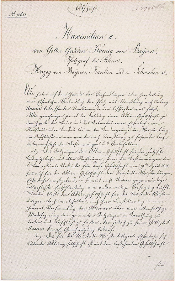 Genehmigung des Baus der Pfälzischen Maximilansbahn Neustadt-Wissembourg durch den bayerischen König Maximilan II am 3. November 1852